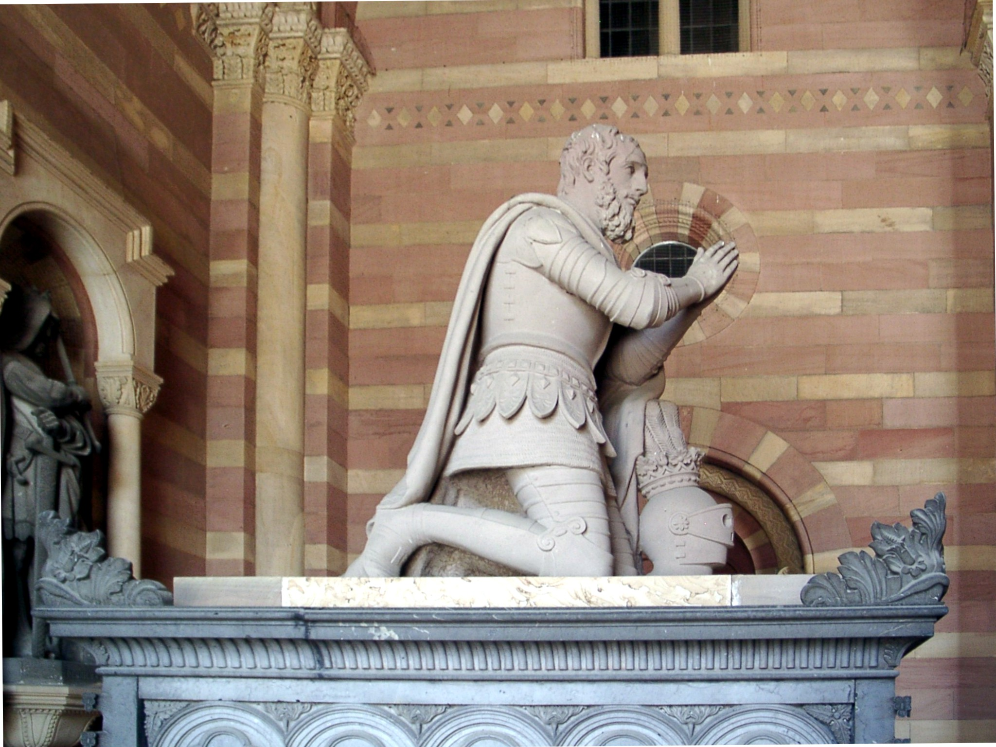 Denkmal für Adolf von Nassau, Domvorhalle Speyer - Bildhauer: Landolin Ohmacht